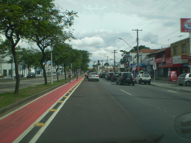 Nova ciclovia na Avenida Marechal Floriano Peixoto - Curitiba (jan. 2012)